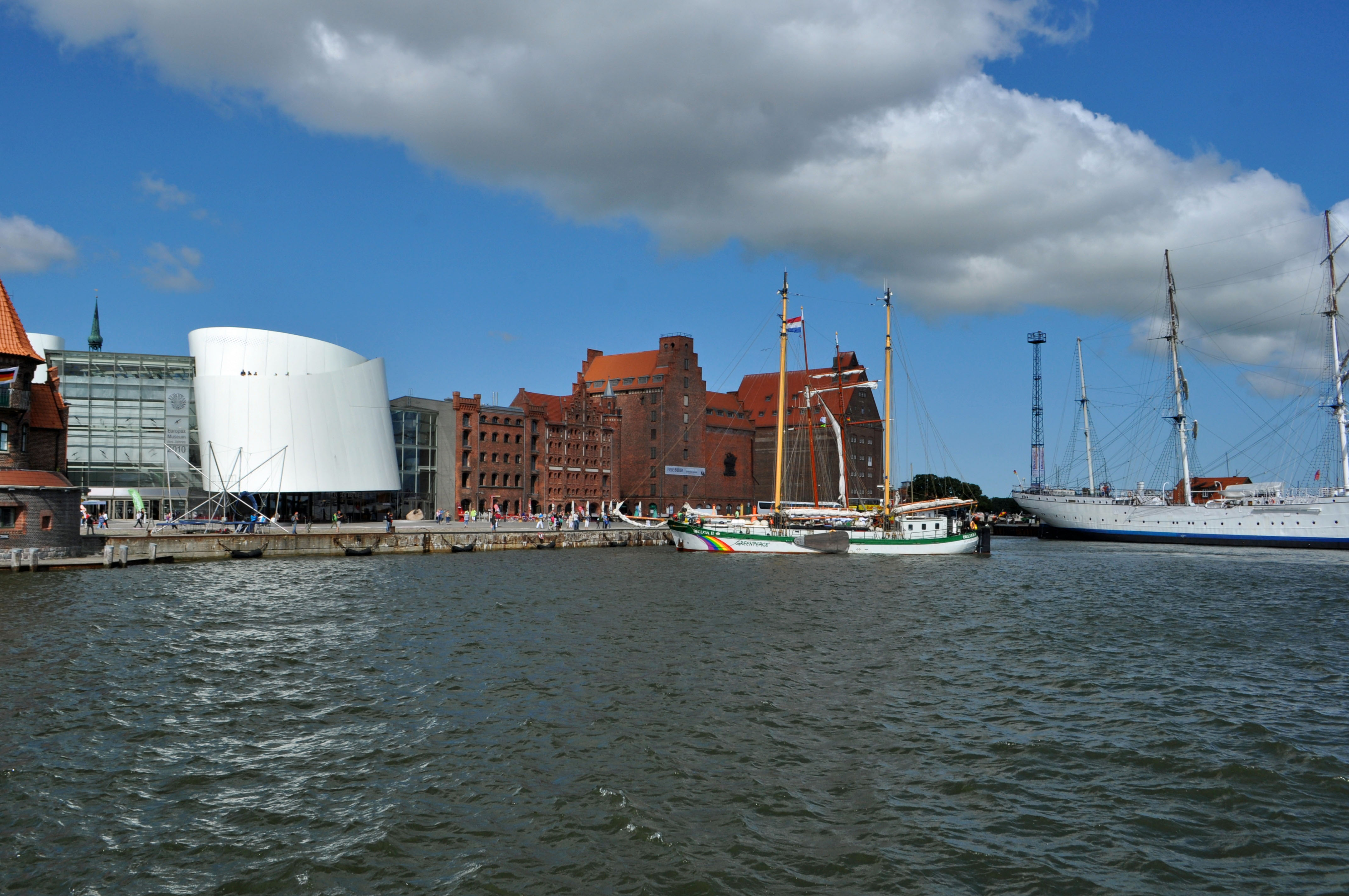 Die Beluga II der Organisation Greenpeace am 11. Juli 2013 im Hafen von Stralsund.. Rechts im Bild die Gorch Fock an der so geannten "Ballastkiste". Im Hintergrund das Ozeaneum Stralsund und Speichergebäude auf der Hafeninsel.